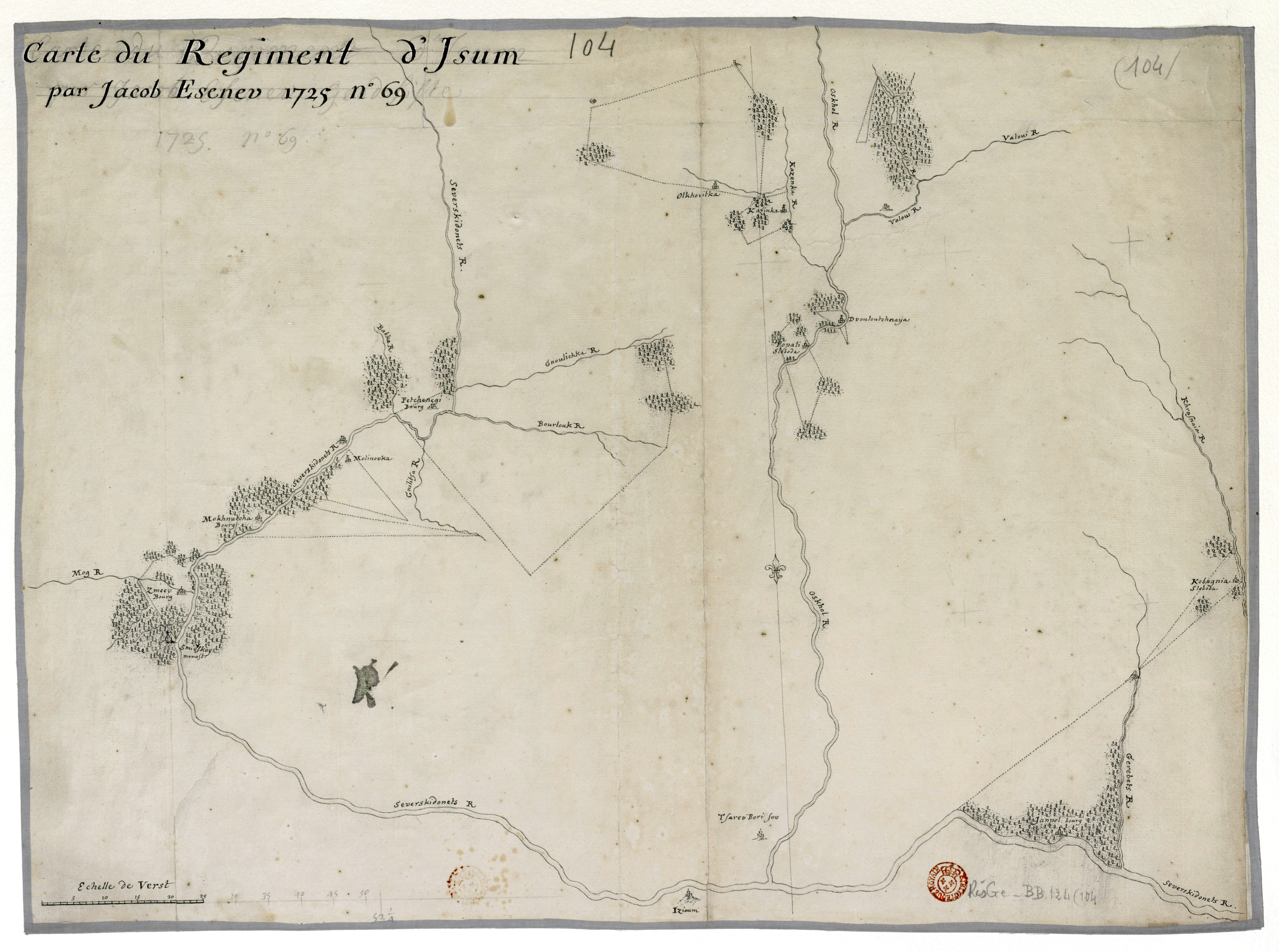 Карта земель Изюмского слободского казацкого полка, составленная в 1725 году геодезистом Яковом Есеневым